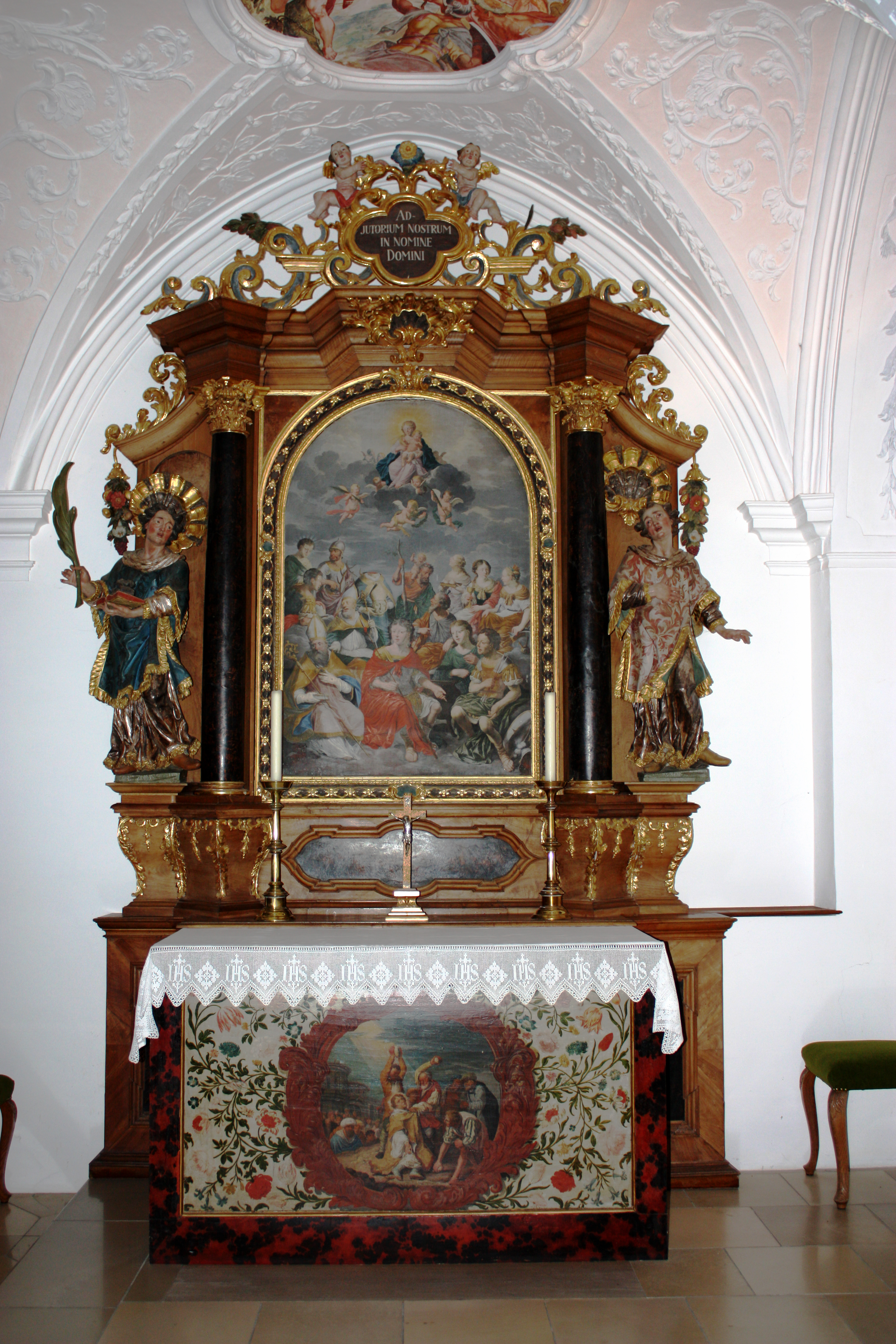 Südlicher Brüderchoraltar in der ehemaligen Klosterkirche der Kartause in Buxheim bei Memmingen - OpenStreetMap(Info)